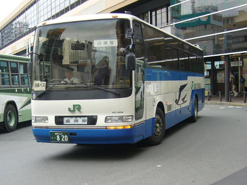 登録番号 登録番号 岩手22き・820 ジェイアールバス東北(JR bus Tohoku)所属 白樺号用 日野・セレガ